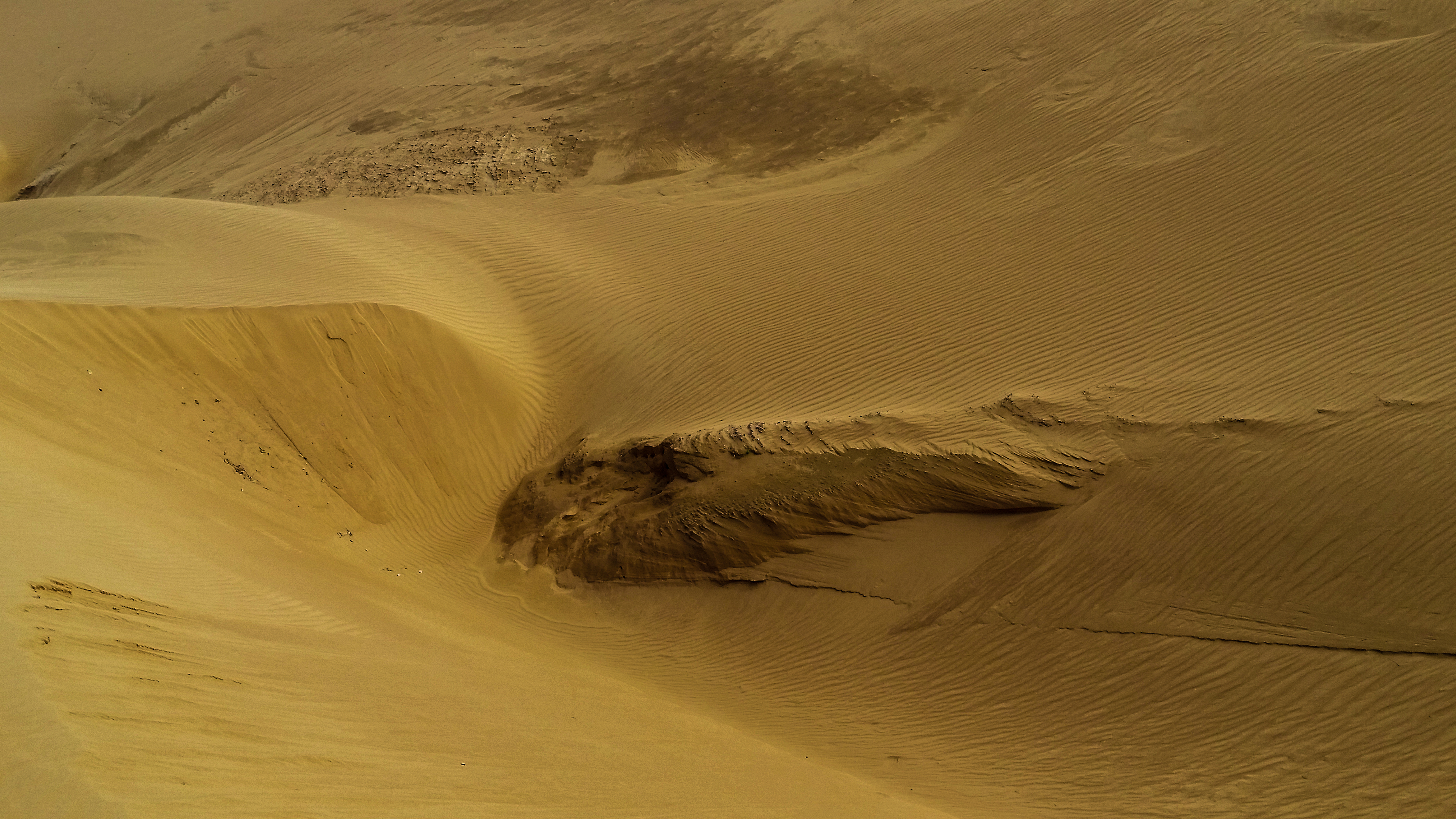 Colombia Esta fotografía fue tomada en un área protegida de Colombia con el código 130 del RUNAP.